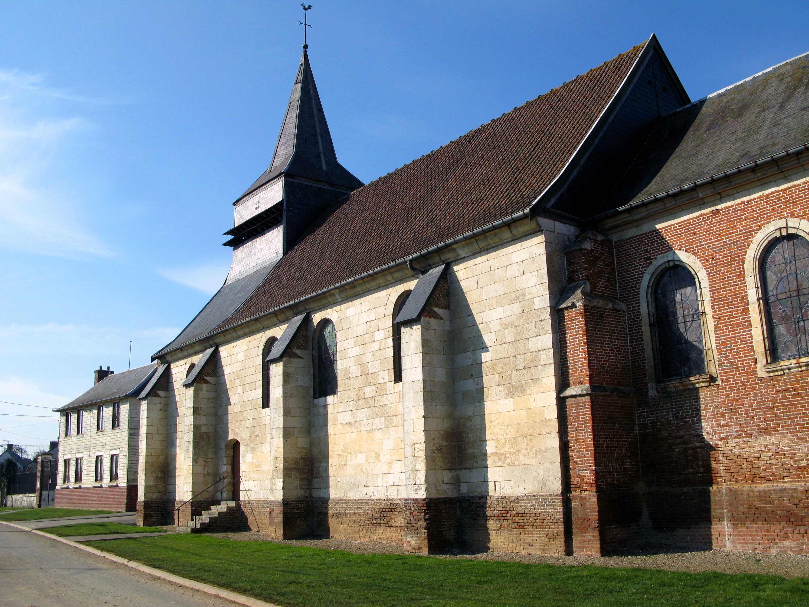 Moyencourt-lès-Poix (Somme, France) - L'église. . .